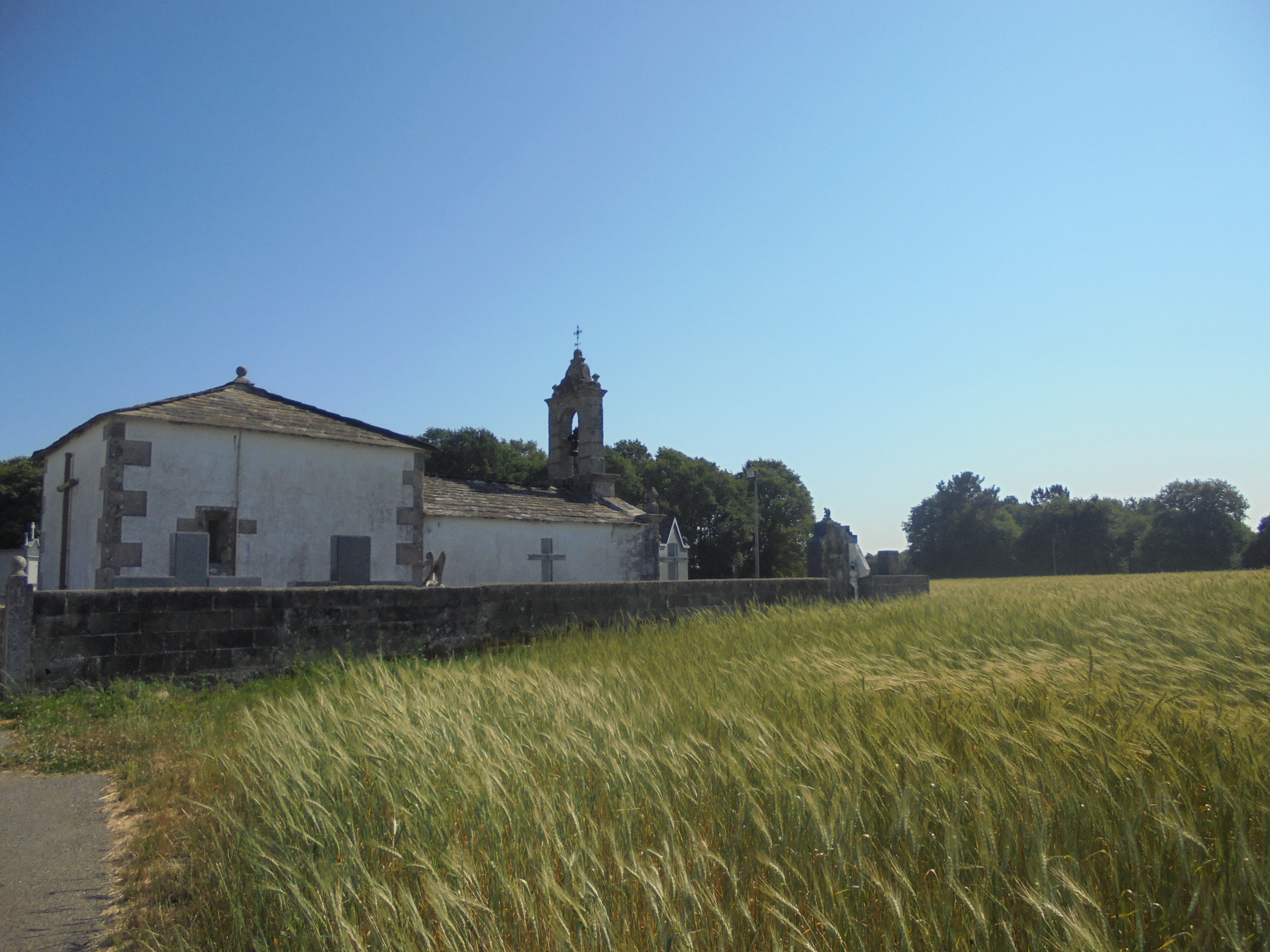 Igrexa parroquial de Recimil ( Lugo)